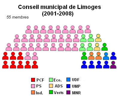 Composition du conseil municipal de Limoges aux élections municipales de 2001